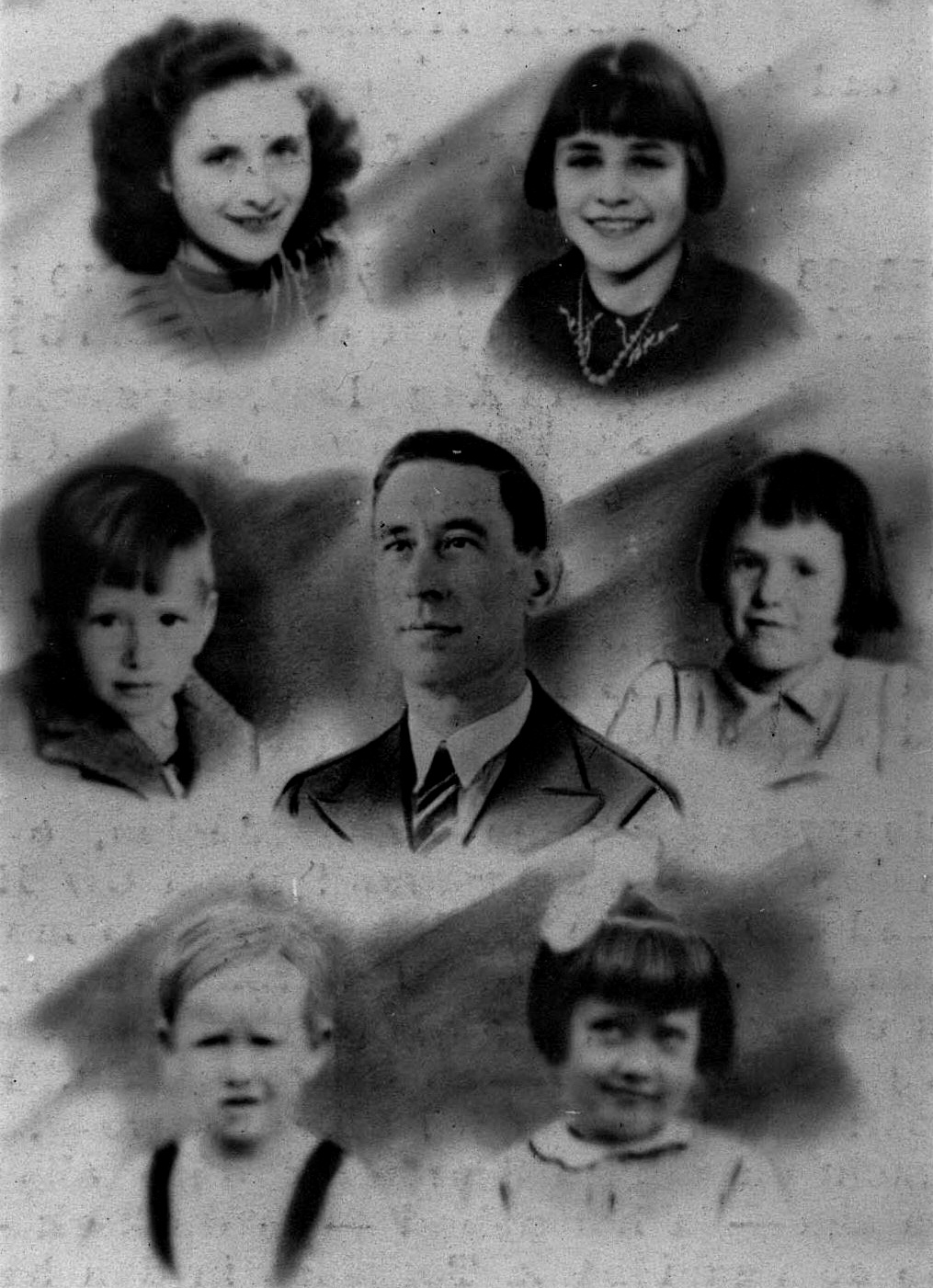 Bidprentje van vader Joseph Huiskens (45) en zes van zijn kinderen, die allen omkwamen bij het geallieerde bombardement op Maastricht (Quartier Amélie), 18 augustus 1944. Vanaf linksboven kloksgewijs: Mina (23), Netty (13), Tiny (10), Corry (6), José (4) en Michel (3).